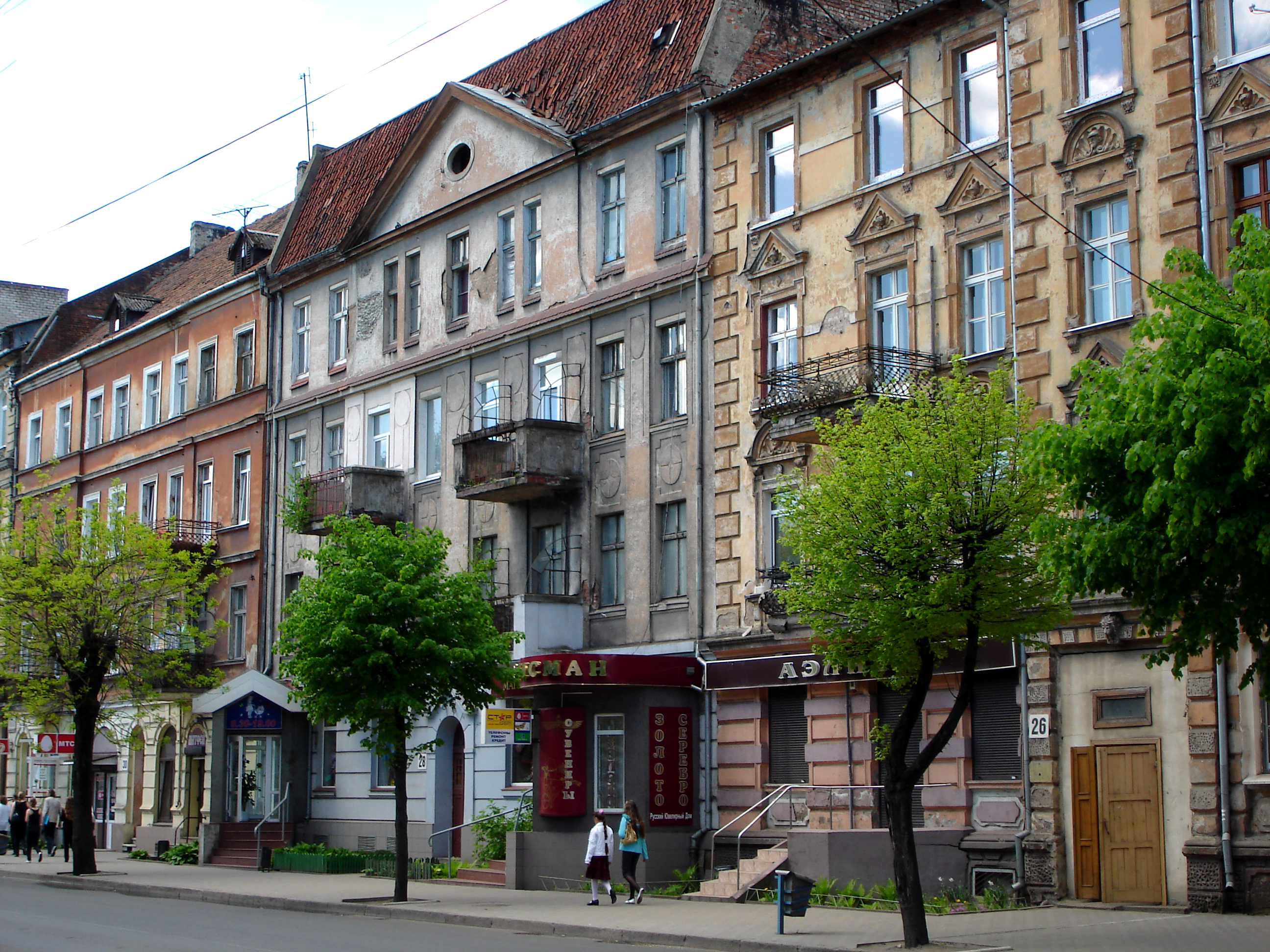 Russische Föderation: Häuserzeile in Sovetsk